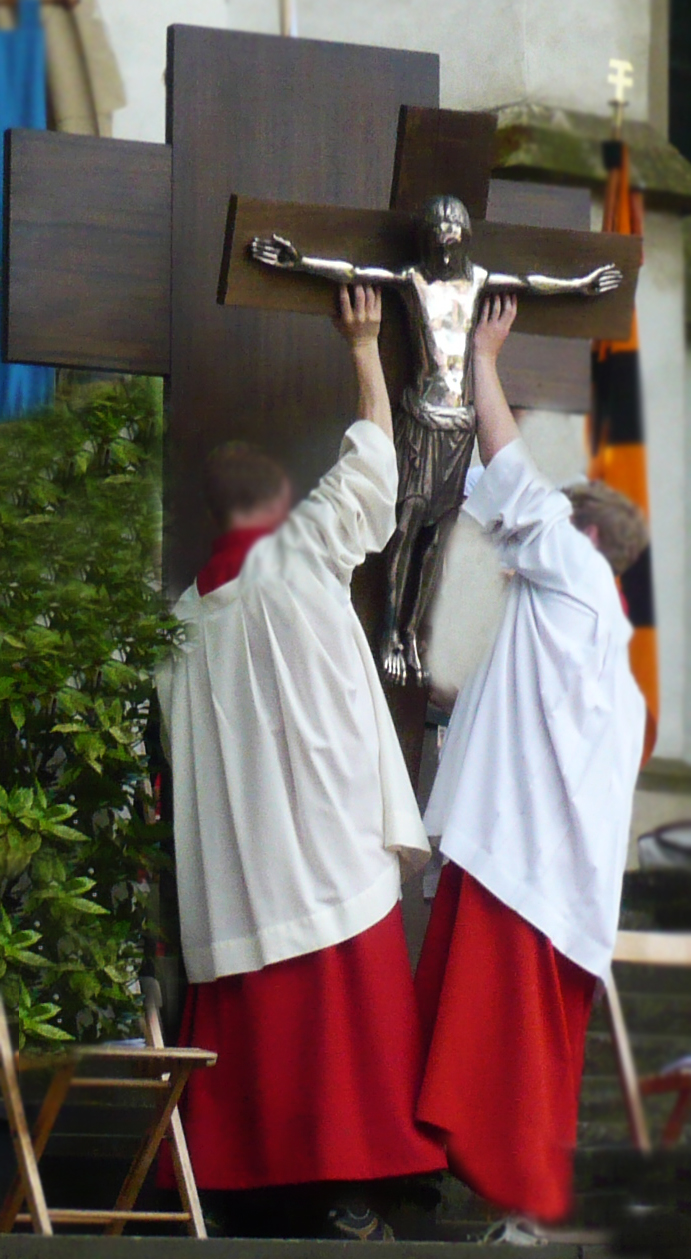 Das Heilige Kreuz von Stromberg wird anläßlich der Messfeier zur Wallfahrt vor der Kirche aufgerichtet.